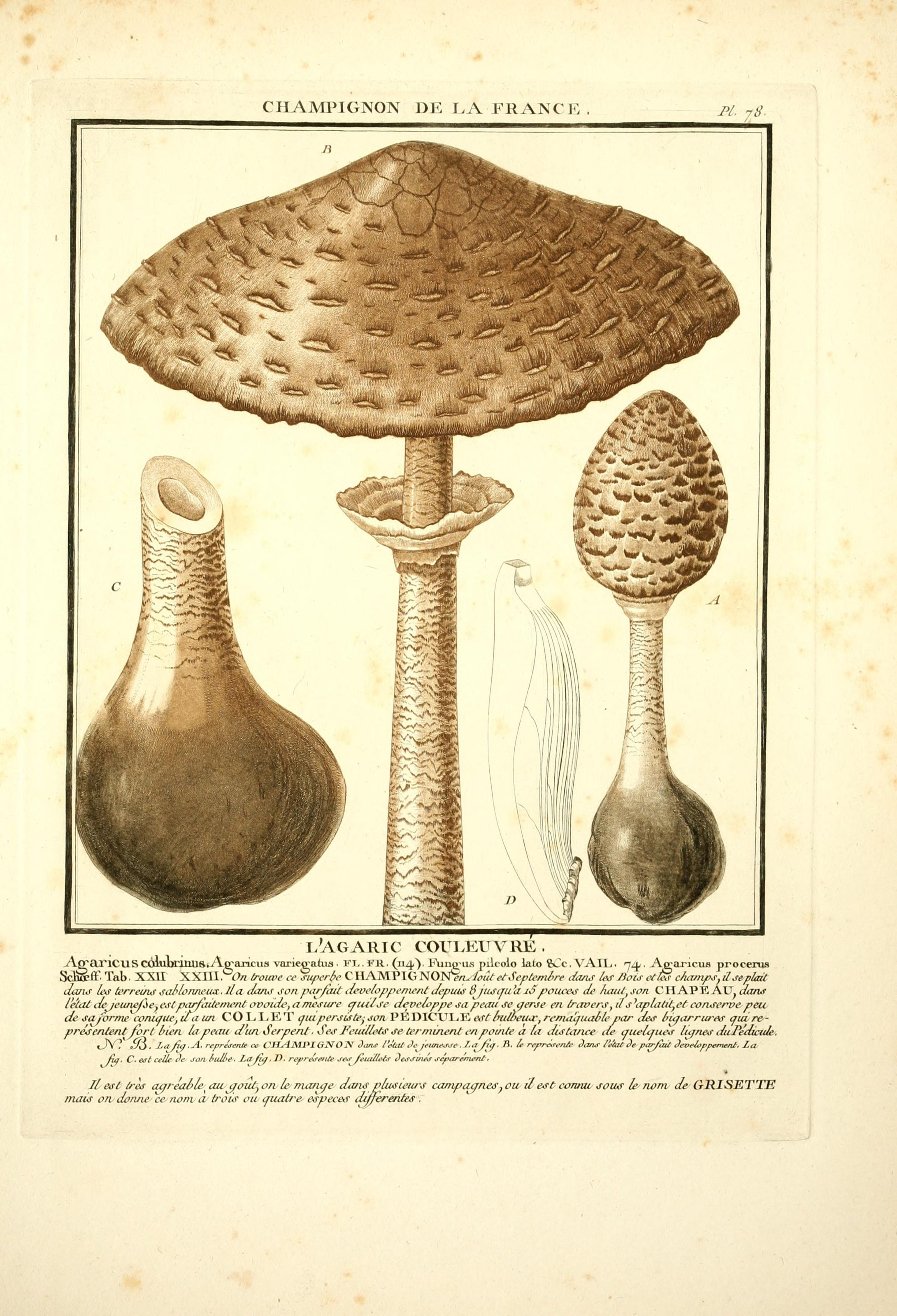 CHAMPIGNON DE EA FRANCE . PI. 78- l'agaric couleuvre. Affaj'lCUSCokJjrinus.Ao-ajTCus voriegatiia • FJ..FR. (114"). Fuiio;ils pilcolo lato SCc. VATL. 74, . Agaricus procerus ScËJrft' Tab. XXII XXI11. £.« trouve ce superbe Q\\KiAV\ii^i0^ten^Uût erSeptembre dans les Bois e/iès ' champs,ilseplaH dans Lys terrevut sallonncux . il a dans son parfait développement depuis fi /usqtt'a jJ pouces de haiil,son C'IIAPK AU. dans a mesure quilse développe sa peau se qerse en travers, il ' s'aplat/^et conserve peu ' qui persiste^ son PMïyiC~VlA.li\rtlrull.eua' f remaqual.le par t les Inqarrures qui re l'étal dejeunetàe . est parfaitement ovoidcja mesure quilse développe sa peau se t/erse en travers . il ' s^aplatityCt conserve peu de sa forme conique . u a un COL.I*KT qui persiste^ son PEDICUI.K. est lniweua.' t rcma'qualle par t les Inqarrures qui re- présentent fort lien la peau d'iui Serpent . Ses Feuillets se terminent en pouite a la distance de quelques lujnes duPe'dicide. tJY? Jij. La fia. A. représente ce l'UAAU'IONON J.i/W t'eàU Je /eunes.re . La fia. 7Î. te reprtsren/e Dans ieiut t?e parfiut Jevetappement. La fia. C. est cette Je son lull.e. I*a fia . Ti. reprirent? ses /eut/tels a essuies séparément . Il est très agréable t auj/oul,on le ma/uje dans plusieurs campaqneSjOU il est connu sous le nvm de GRISETTE mais on donne ce nom a trois ou quatre espèces 1 différentes .